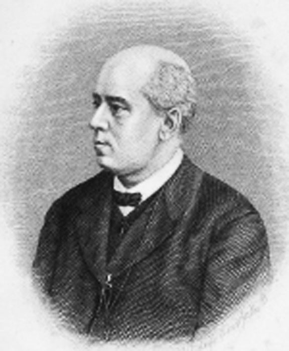 Ф.А. Меркин, Портрет Адольфа Петровича Берже. - 1886. Гравюра на стали; 11,5х9,6; 24,6х15,5 см